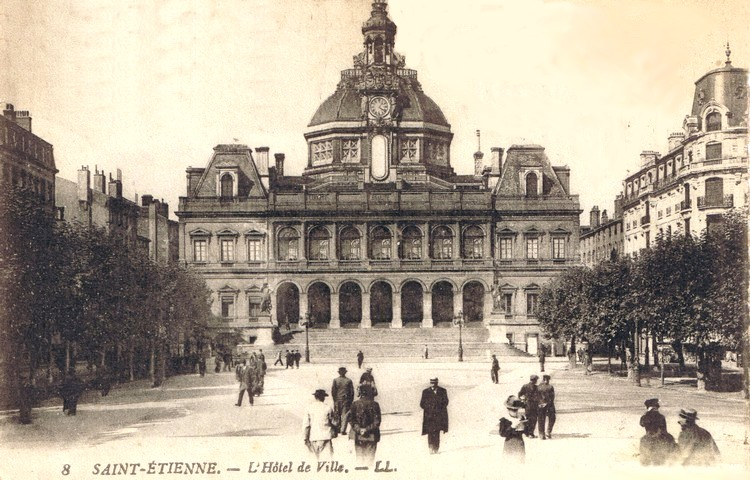 Hotêl de ville de Saint Etienne